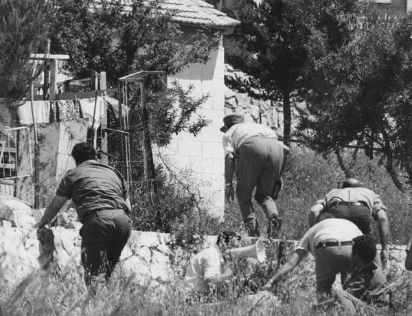 אסון מעלות. שר הביטחון משה דיין במרכז, ליד ביה"ס במעלות בזמן הפיגוע.